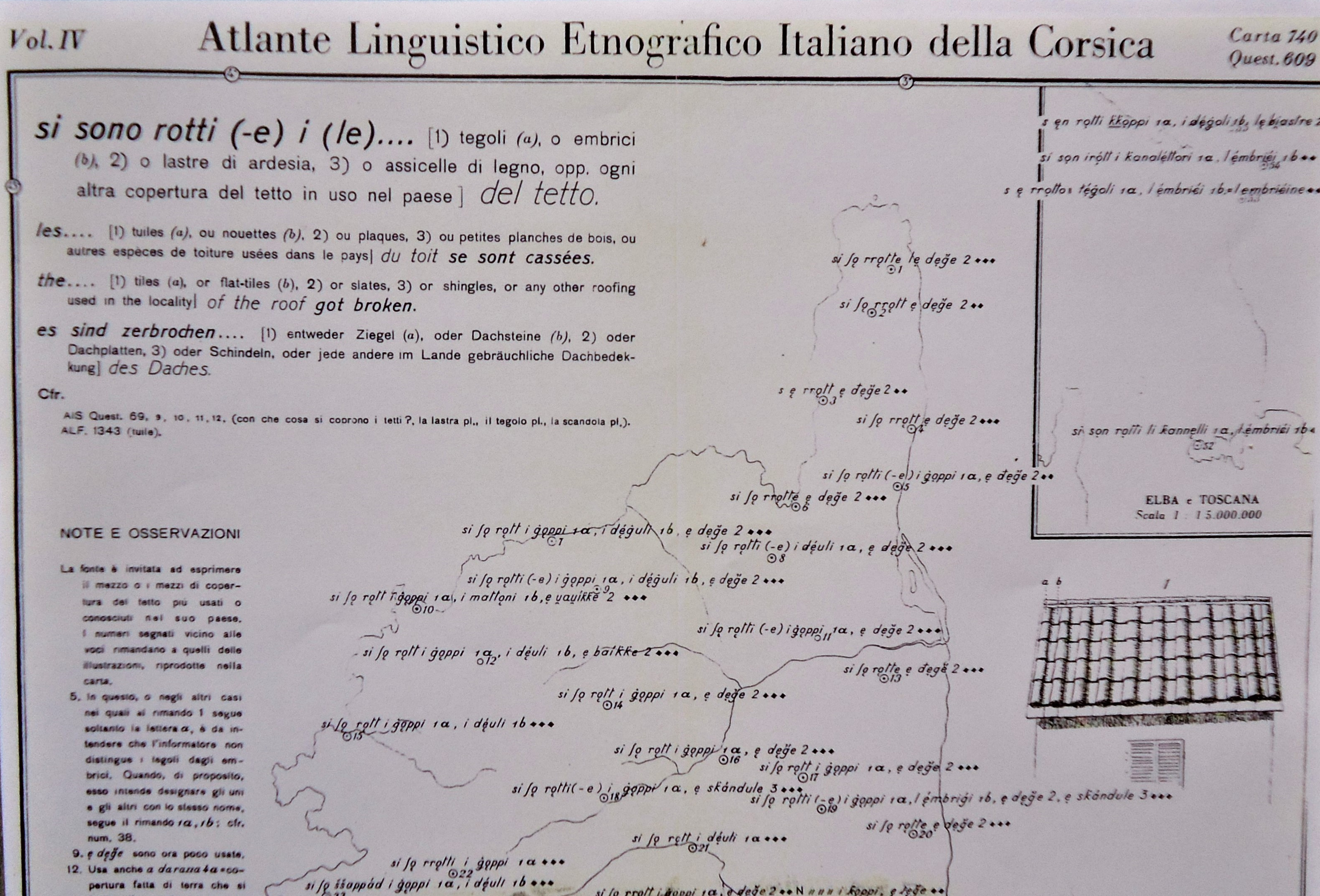 Particolare del vol. IV, carta 740, questionario 696 dell'Atlante Linguistico Etnografico Italiano della Corsica, 1932, pubblicato da Italia Dialettale.